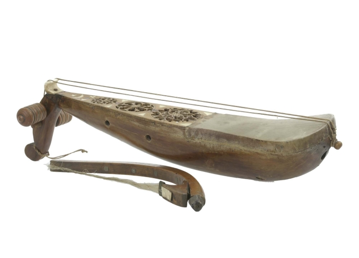 Deze gestreken korthalsluit, of vedel, heeft 2 snaren en dus 2 stempennen. Vanaf de stempennen lopen de snaren -waarschijnlijk van darm gemaakt- over een brug naar de onderkant van het instrument waar ze over een kam lopen (die hier ontbreekt), en aan een knop zijn vastgemaakt. De houten klankkast is gedeeltelijk afgedekt met leer, en gedeeltelijk met à jour bewerkt hout, dat versierd is met ingelegd parelmoer. In de klankkast zitten een aantal klankgaten. Dit muziekinstrument (rebab) wordt gebruikt bij de Andalusische muziek in Marokko, met name in de steden waar Moren zich vestigden na de val van Andalusië (1492) zoals Fes, Tetouan, Salé en Rabat.